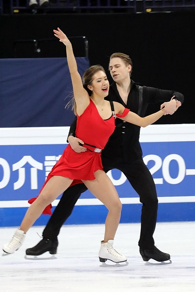 Тейлор Тран / Саулюс Амбрулявичюс (Литва) на чемпионате мира 2017